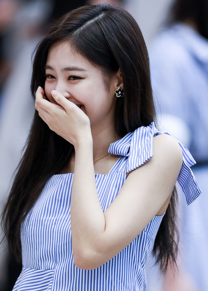 Jennie em um evento de fansign do Black Pink no Live Plaza da COEX em Seul.